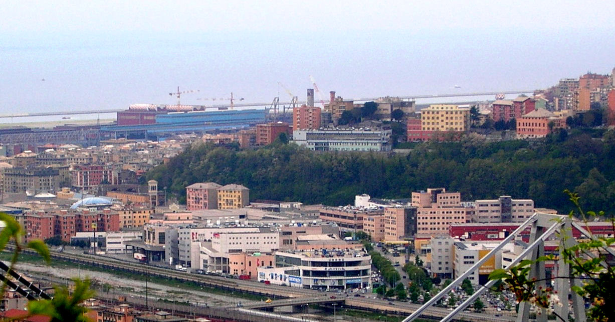 Genova - Veduta Area Campi